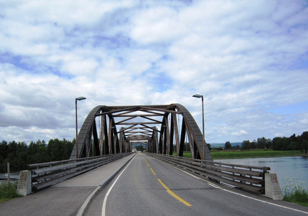 Flisa bru